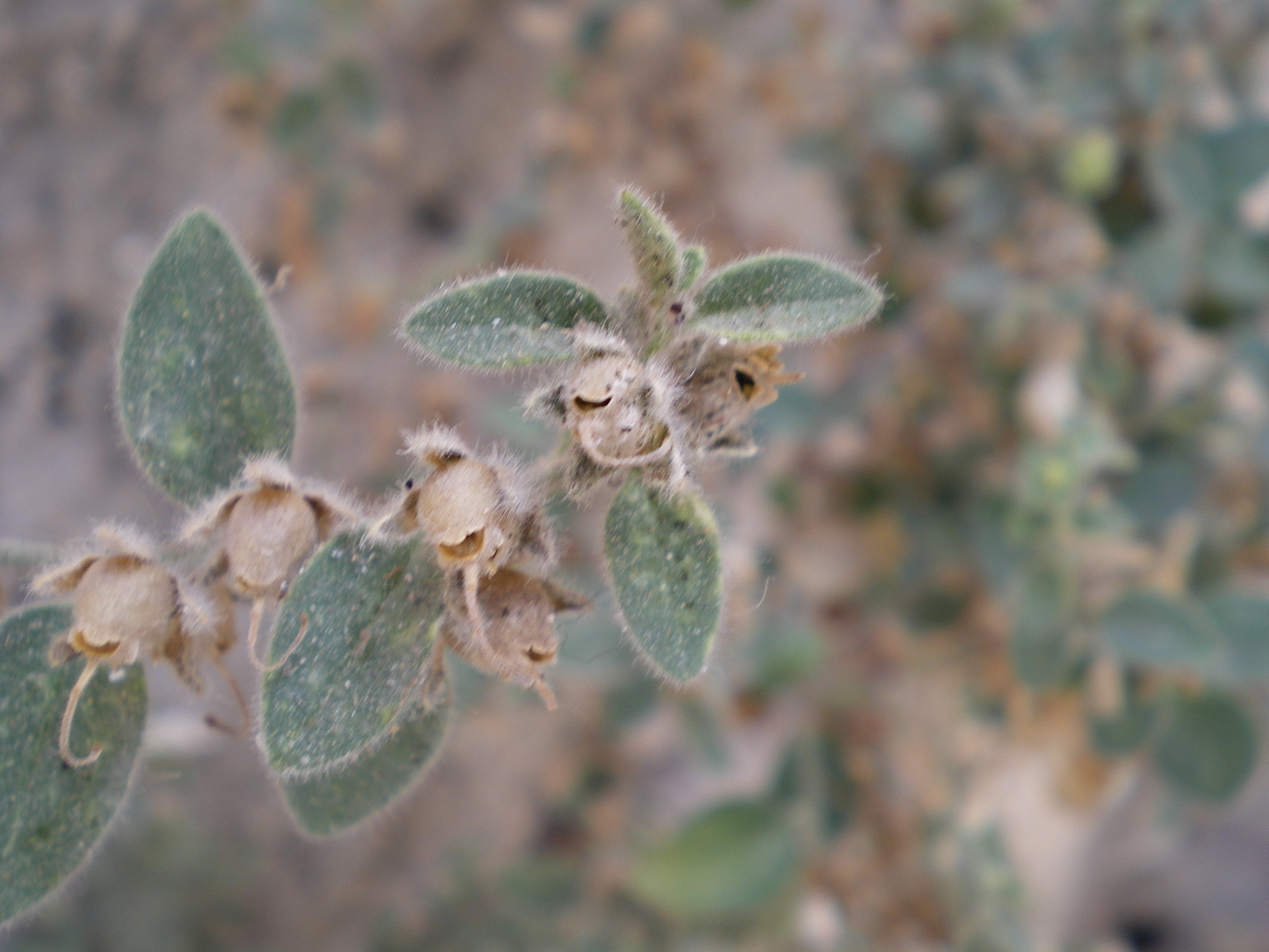 Fotografía de los frutos maduros y hojas de Antirrhinum hispanicum ssp. mollissimum, sobre los muros de la Catedral de Almería.